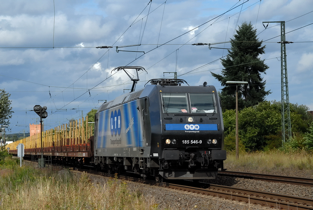 185 546 der OHE im Einsatz für die LTH mit einen Pendelzug Butzbach-Niedergöns